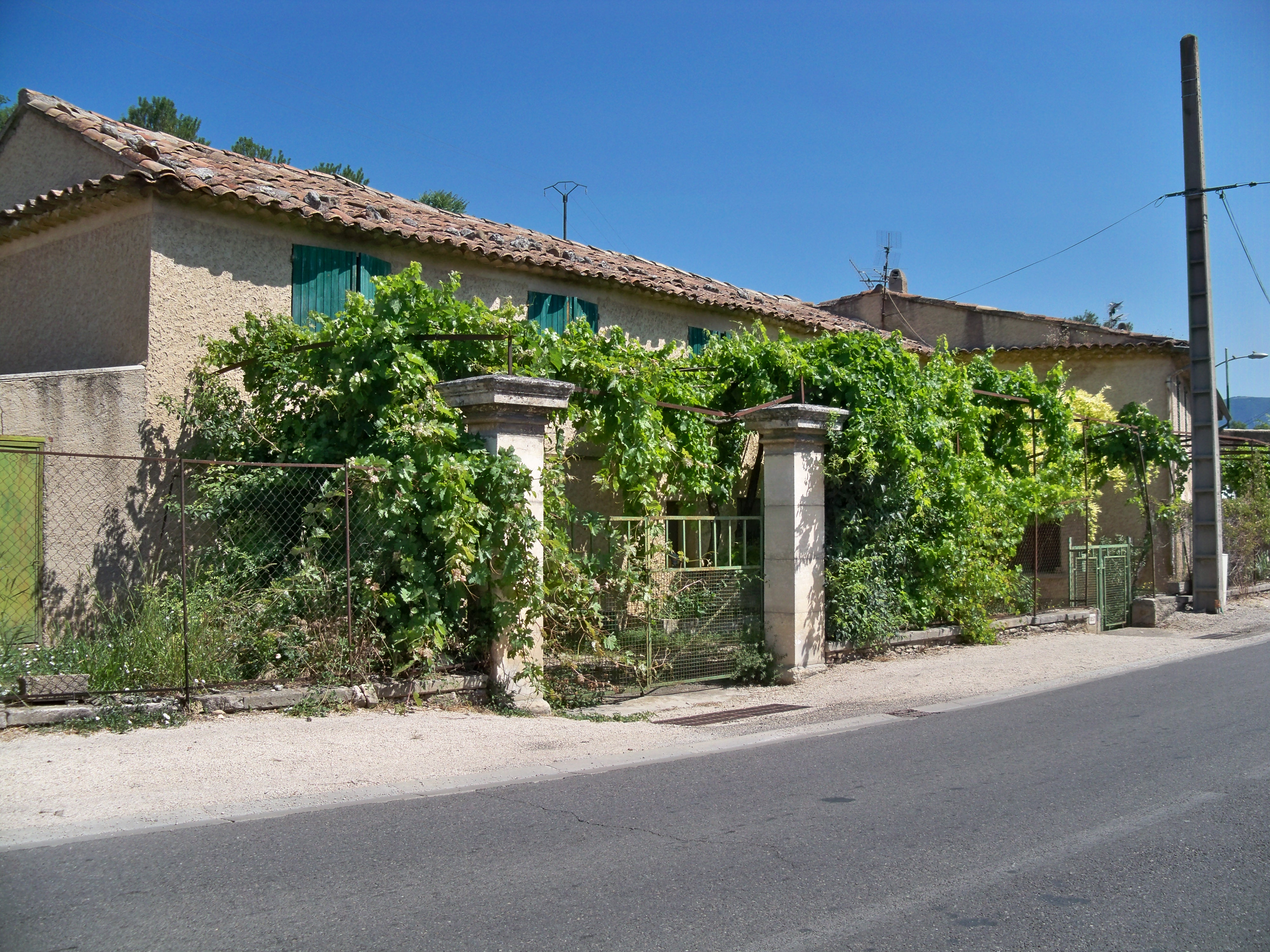 Treille sur la facade e maison, près de la Doa (Apt)